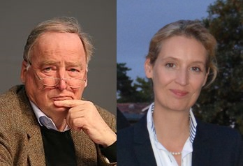 Alexander Gauland & Alice Weidel